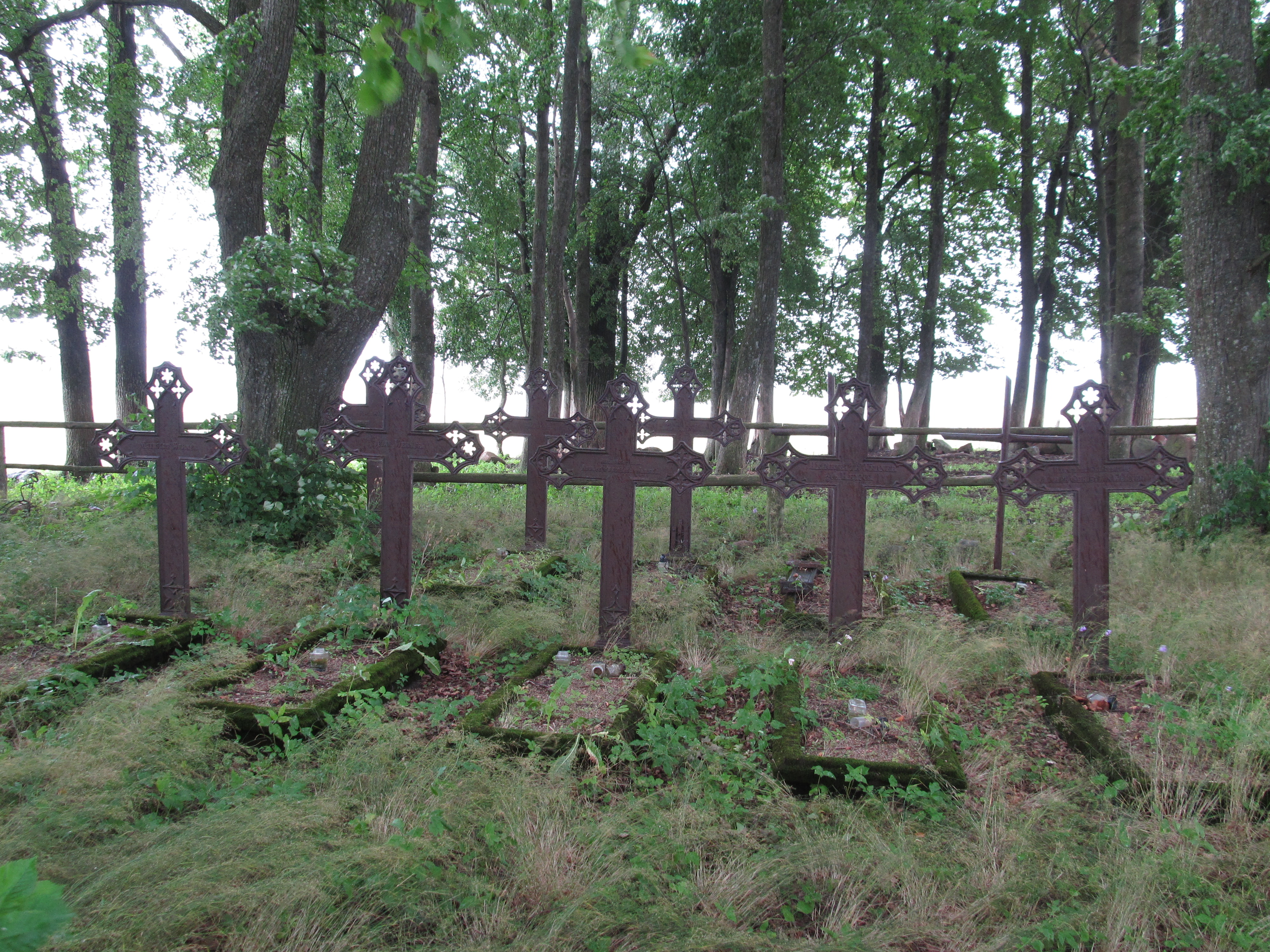 cmentarz ewangelicki, rodzinny Brożówka, Kruklanki